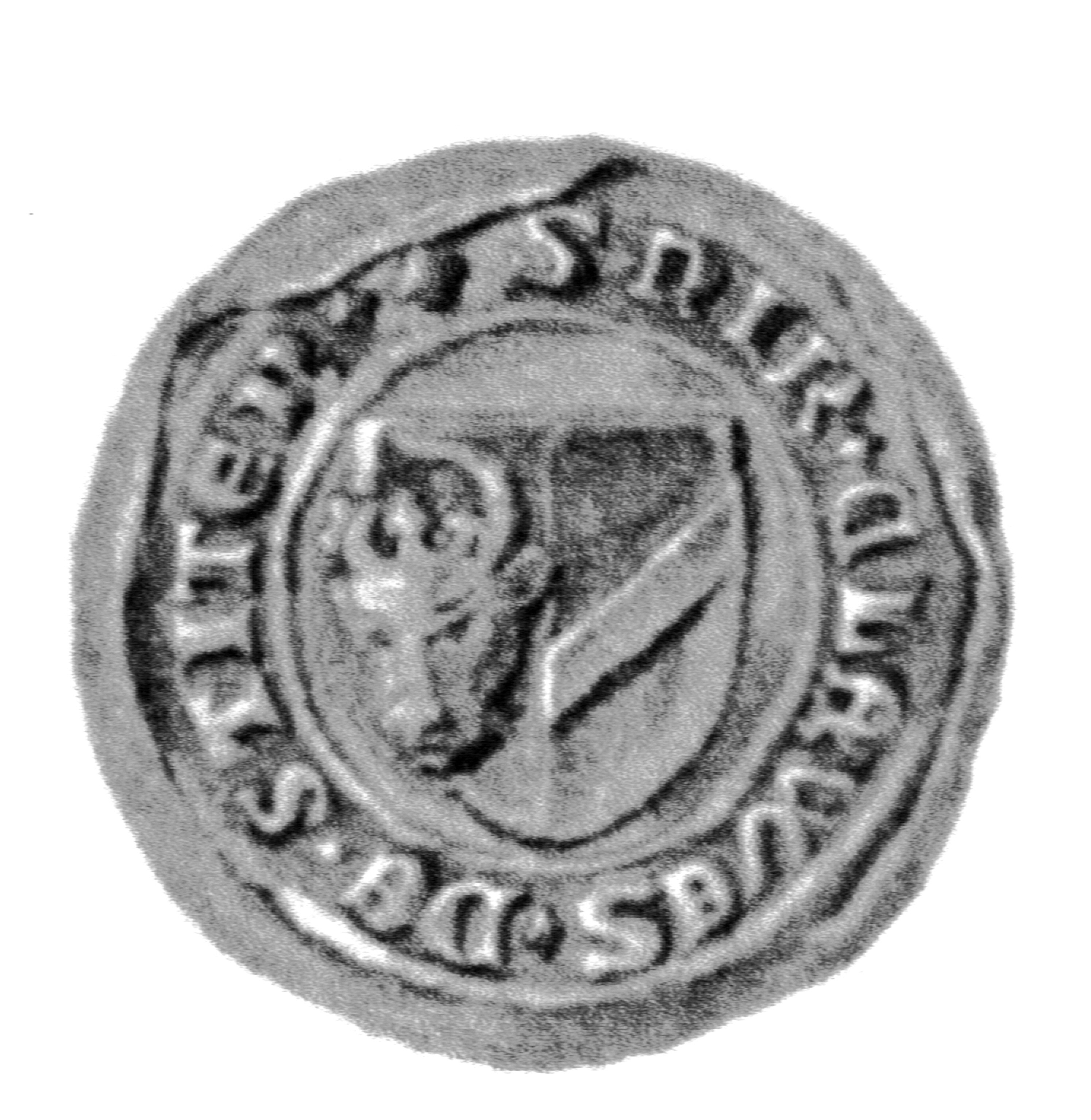 Siegel des Ratsmannes Nicolaus von Stiten. Das Siegel stammt aus der Zeit um 1408. Siehe Emil Ferdinand Fehling: Lübeckische Ratslinie, Nr. 439 (Nikolaus von Stiten).